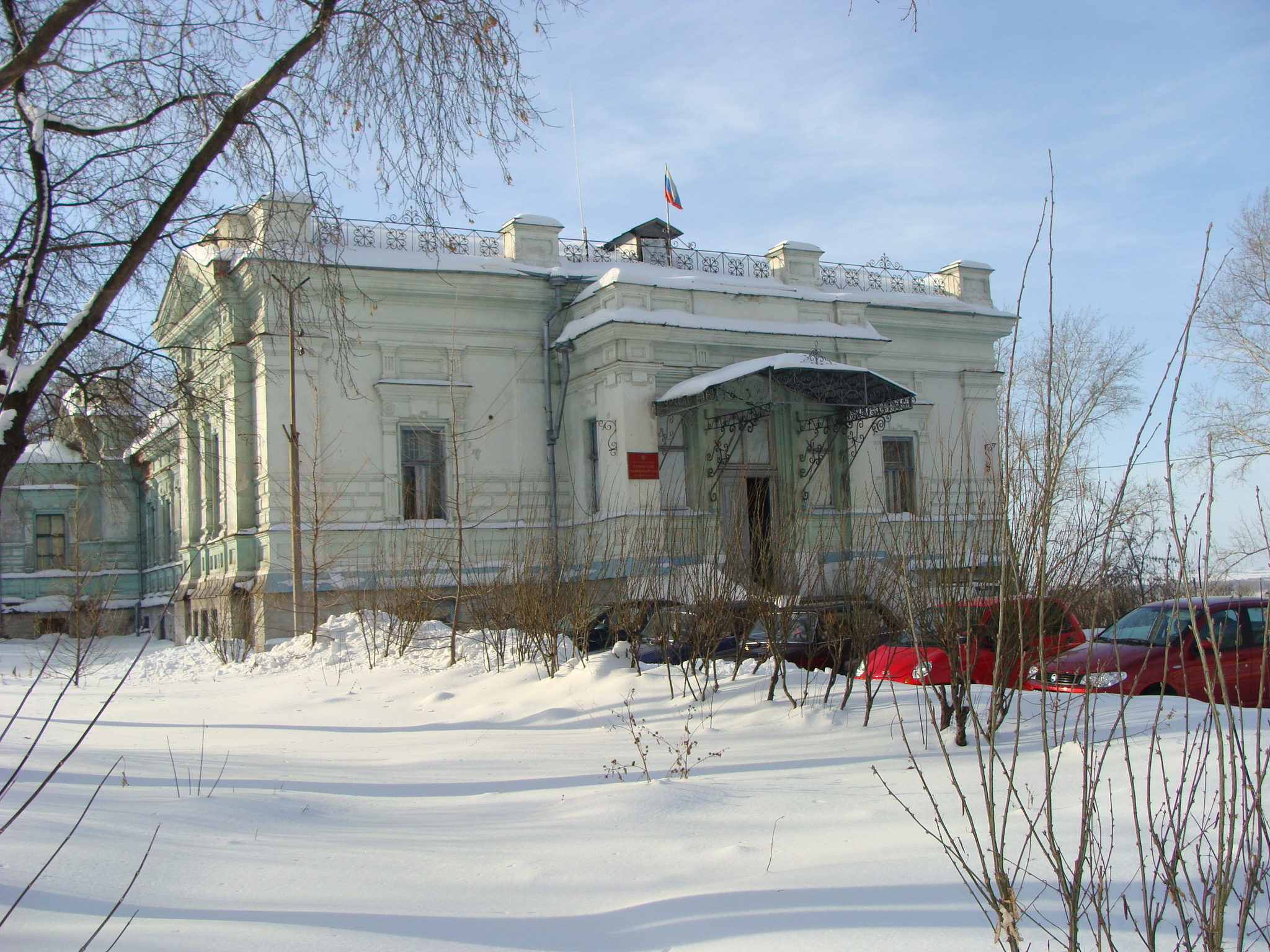 памятник архитектуры XIX века